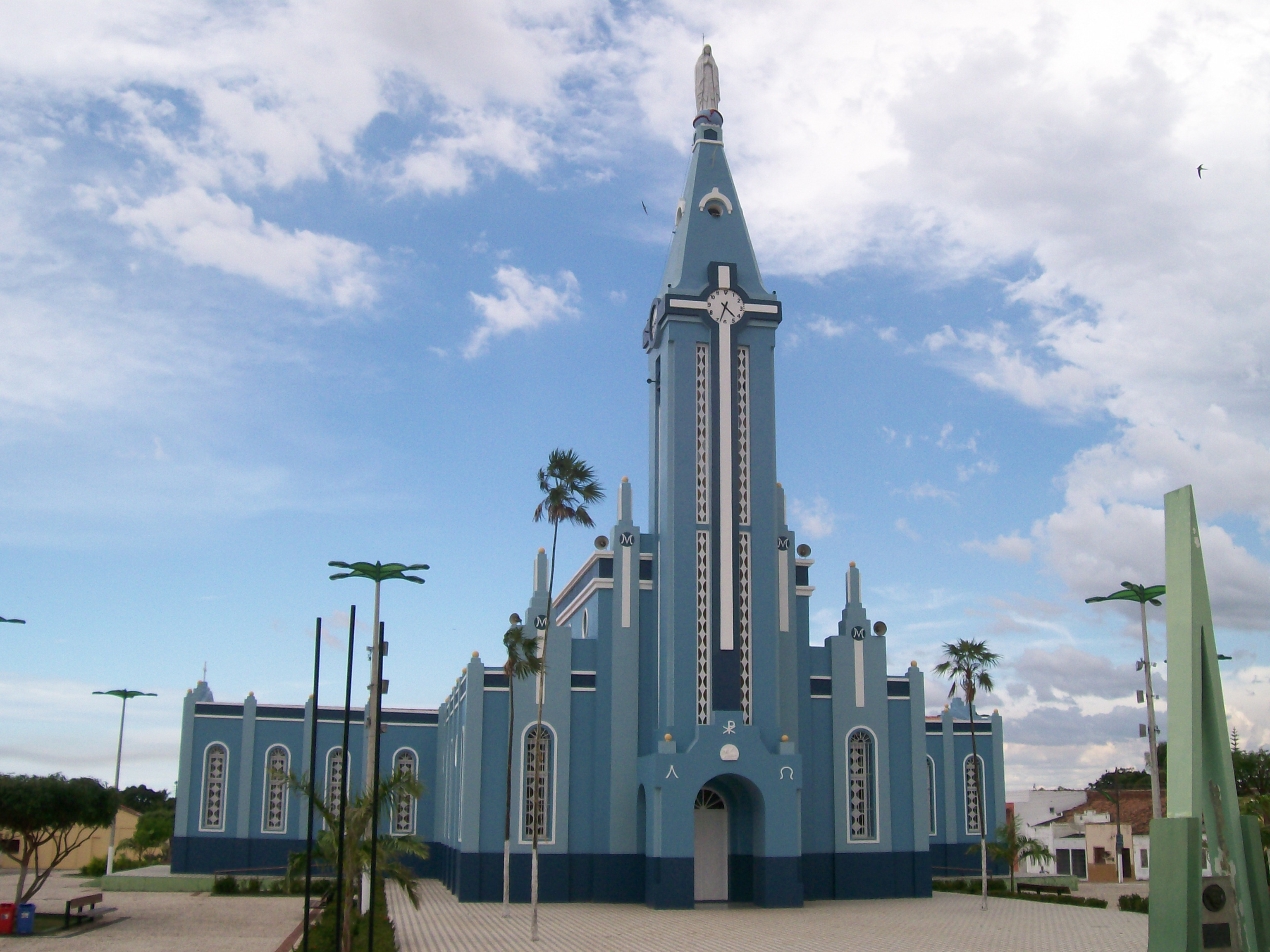 Igreja da Bela Cruz